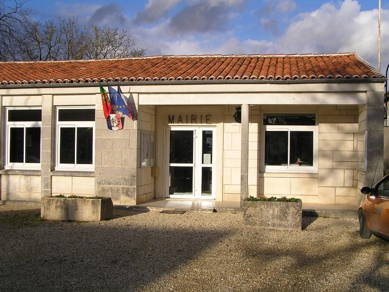 mairie de Saint-Même les Carrières, Charente; France